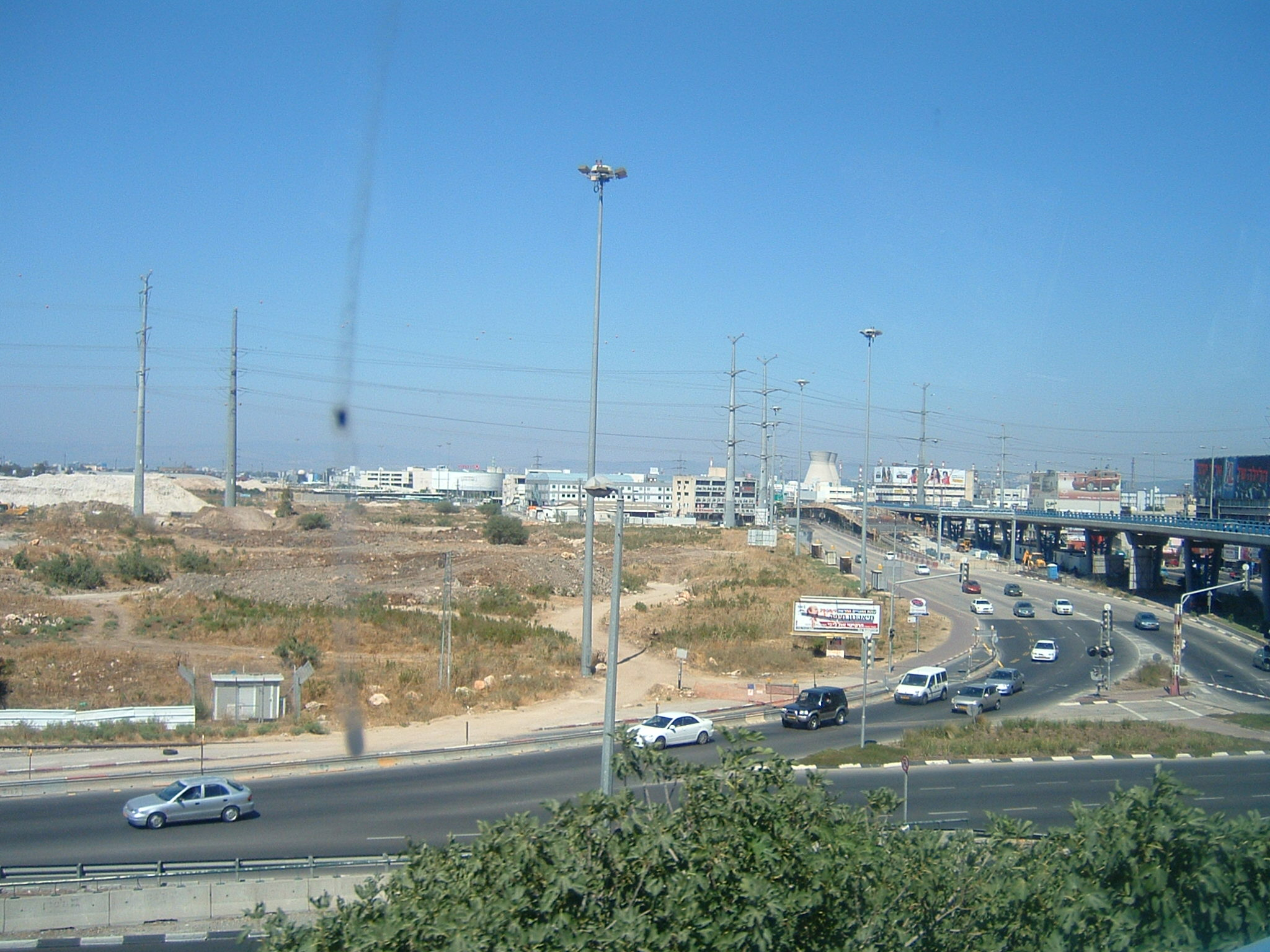 Foto scattata da me il 12 giugno 2008 Veduta di Haifa